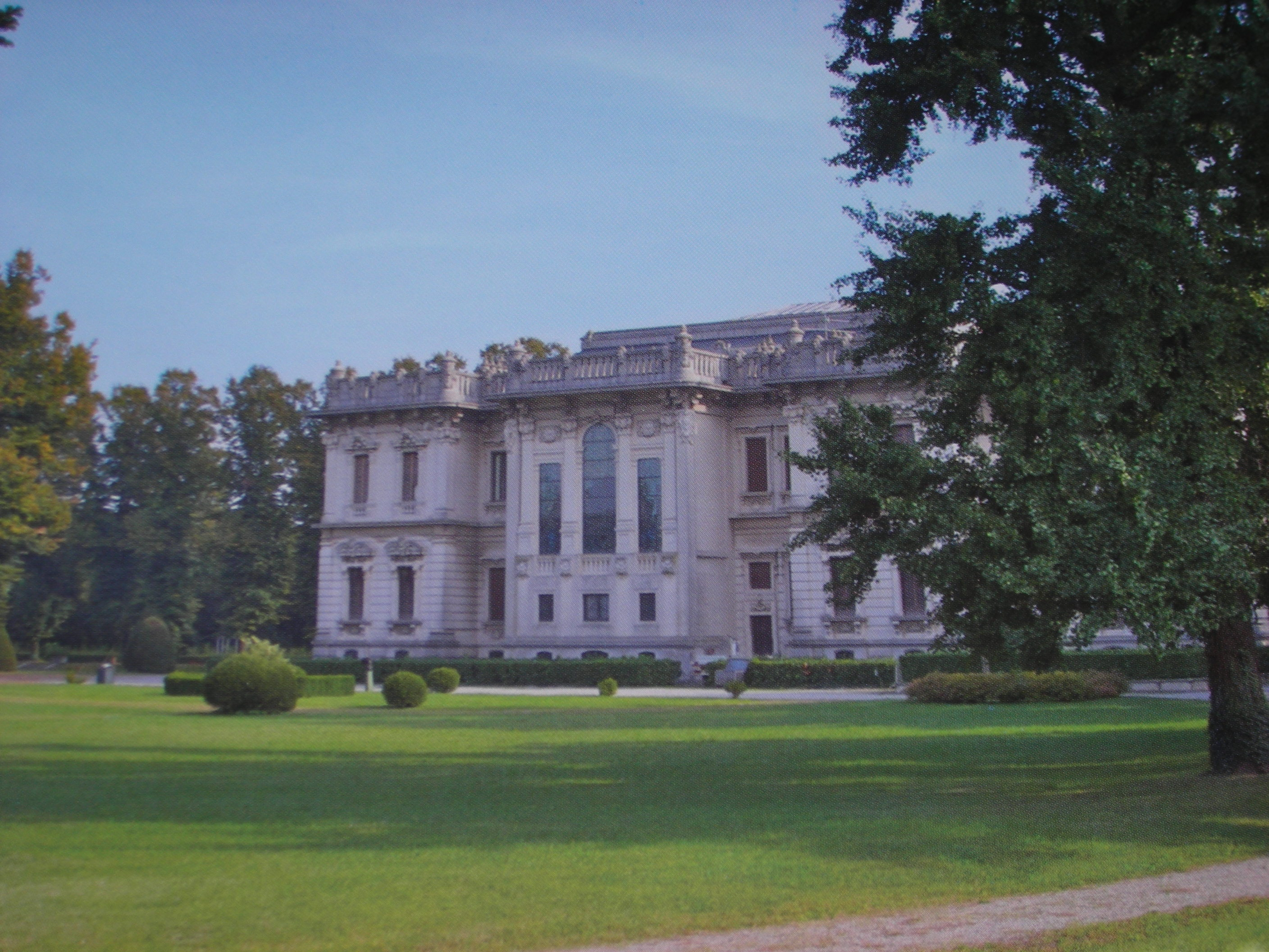 Villa Mazzotti Città di Chiari BS